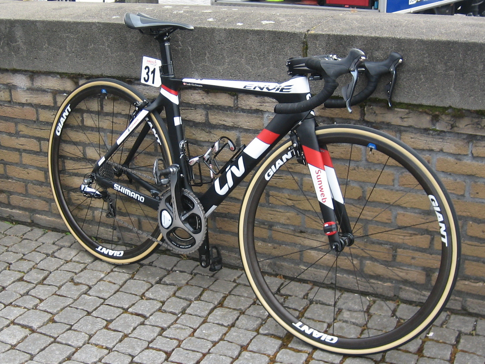 Start van de Amstel Gold Race Ladies Edition 2017 in Maastricht.